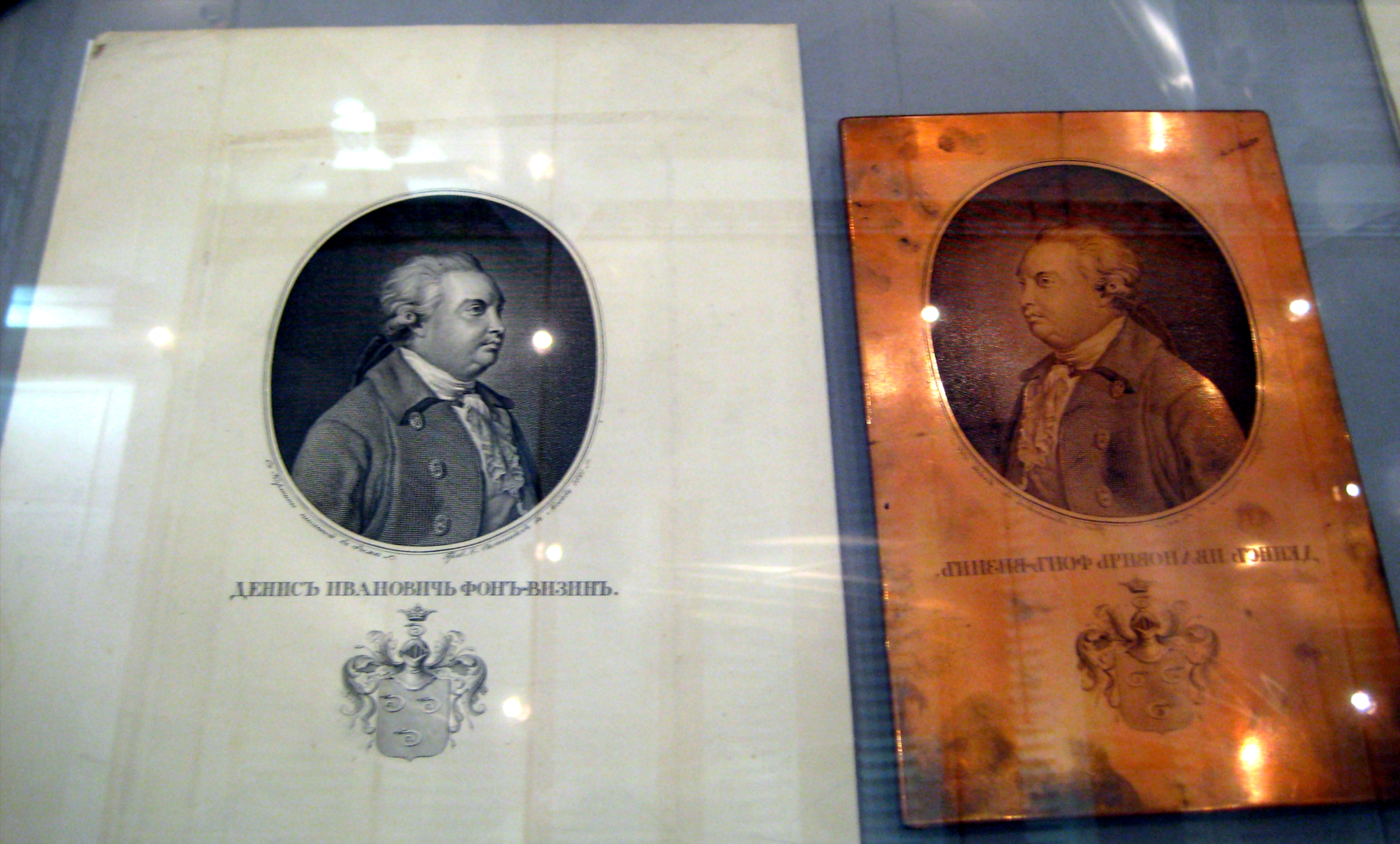 Е.О. Скотников. Портрет Фонвизина. 1821